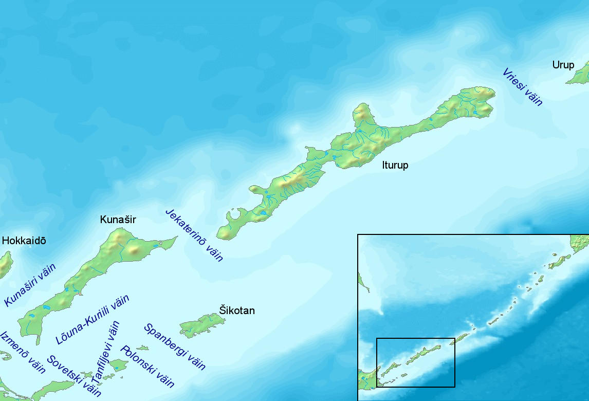 Kuriilid